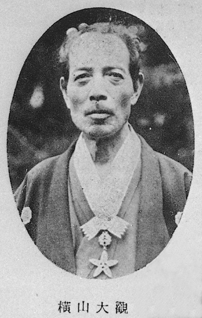 Portrait of Yokoyama Taikan (横山大観, 1868 – 1958)